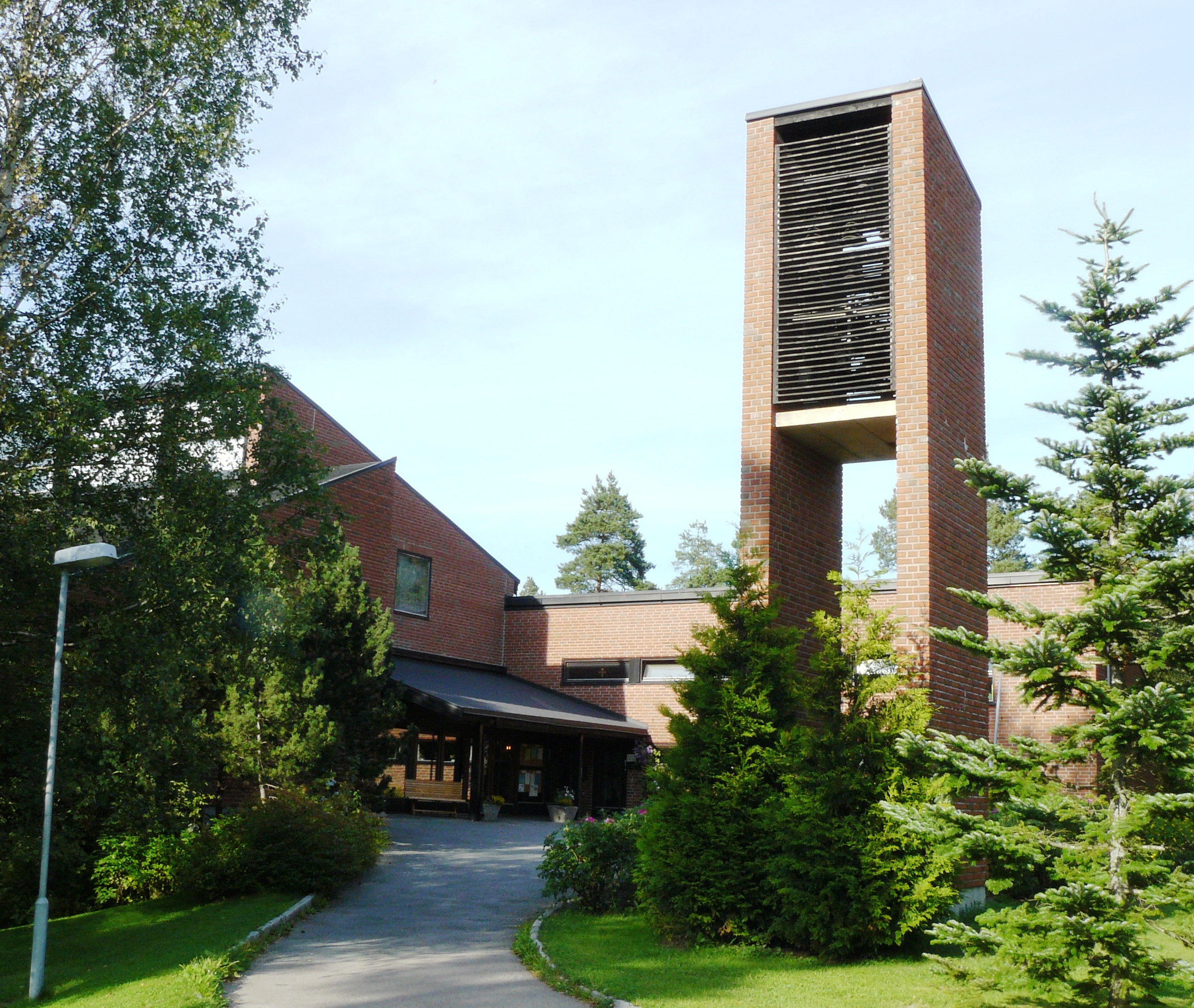 Ellingsrud church, Oslo